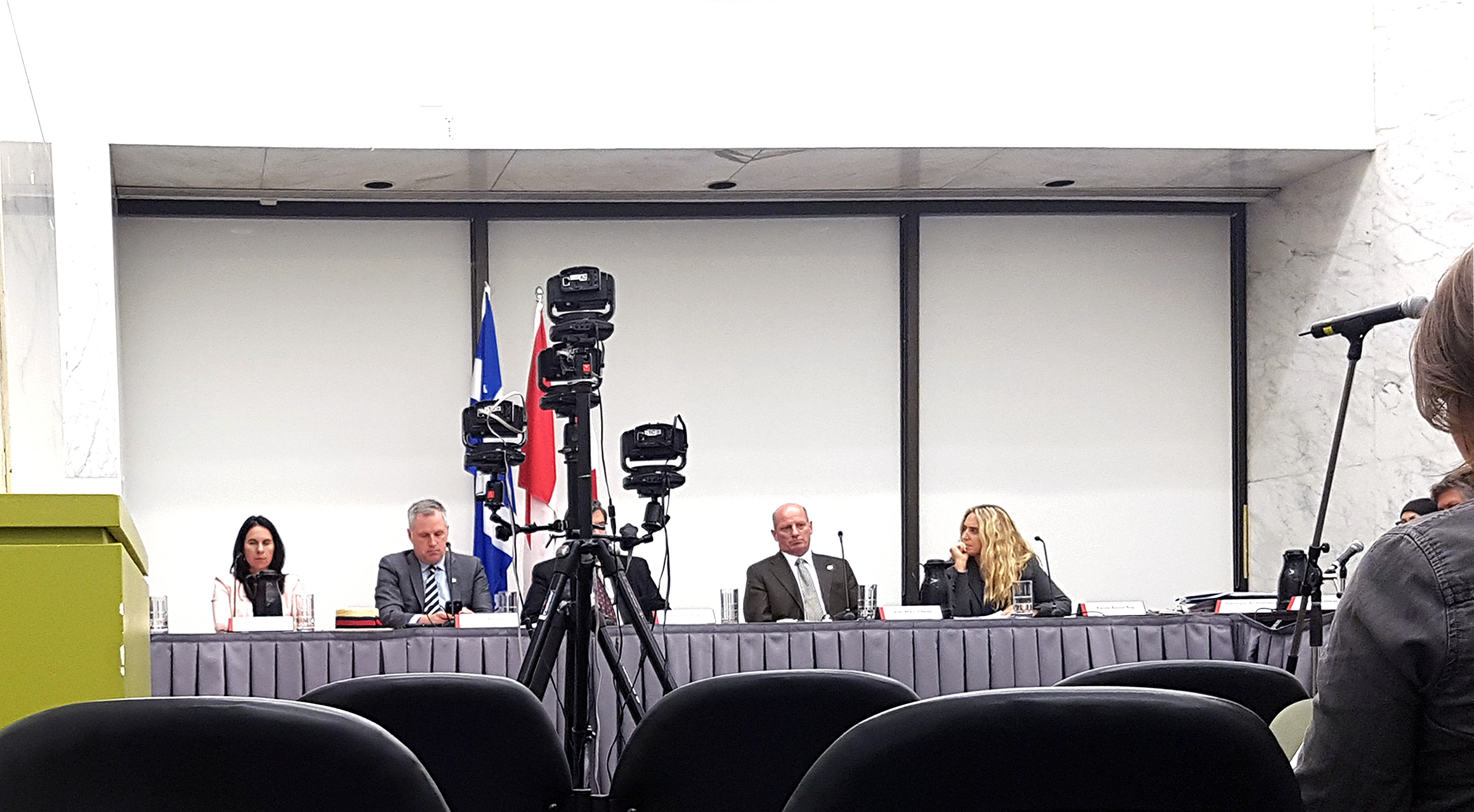 Séance du Conseil d'arrondissement de Ville-Marie du 13 septembre 2016. De gauche à droite : Valérie Plante, conseillère de la Ville, district de Sainte-Marie ; Steve Shanahan, conseiller de la Ville, district de Peter-McGill ; Denis Coderre, maire de l'arrondissement Ville-Marie et maire de Montréal ; Jean-Marc Gibeau, conseiller de la Ville délégué ; Karine Boivin Roy, conseillère de la Ville déléguée. Ville-Marie borough council meeting, 13 September 2016. From left to right: Valérie Plante, city councillor for Sainte-Marie district; Steve Shanahan, city councillor for Peter-McGill district; Denis Coderre, Ville-Marie borough mayor (as mayor of Montreal); Jean-Marc Gibeau, city councilor appointed by the mayor; Karine Boivin Roy, city councilor appointed by the mayor. Montréal, Québec, Canada, 13 September 2016.